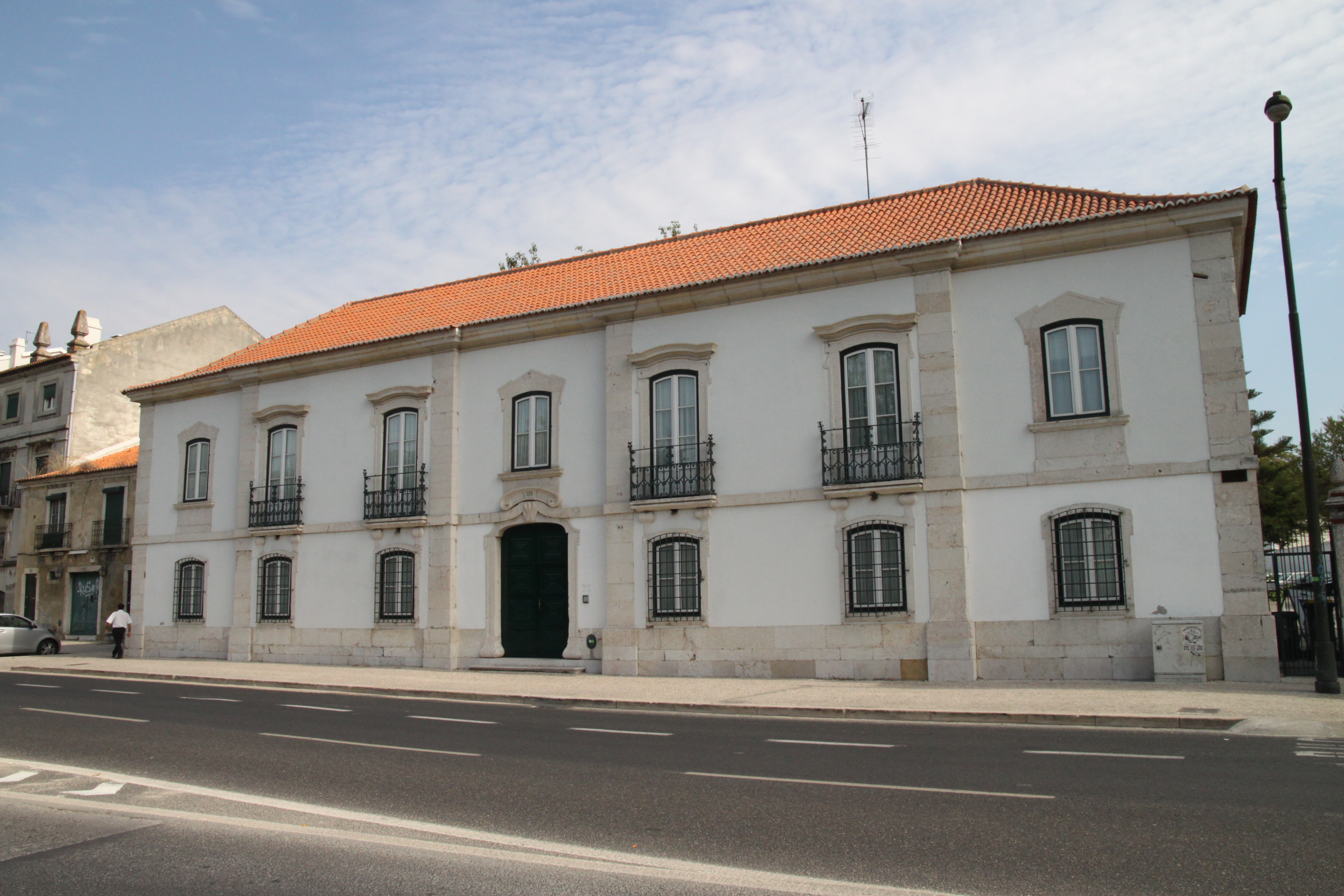 Palácio Beltrão This file was uploaded for Wiki Loves Monuments in Portugal with the unique identifier 97021452.